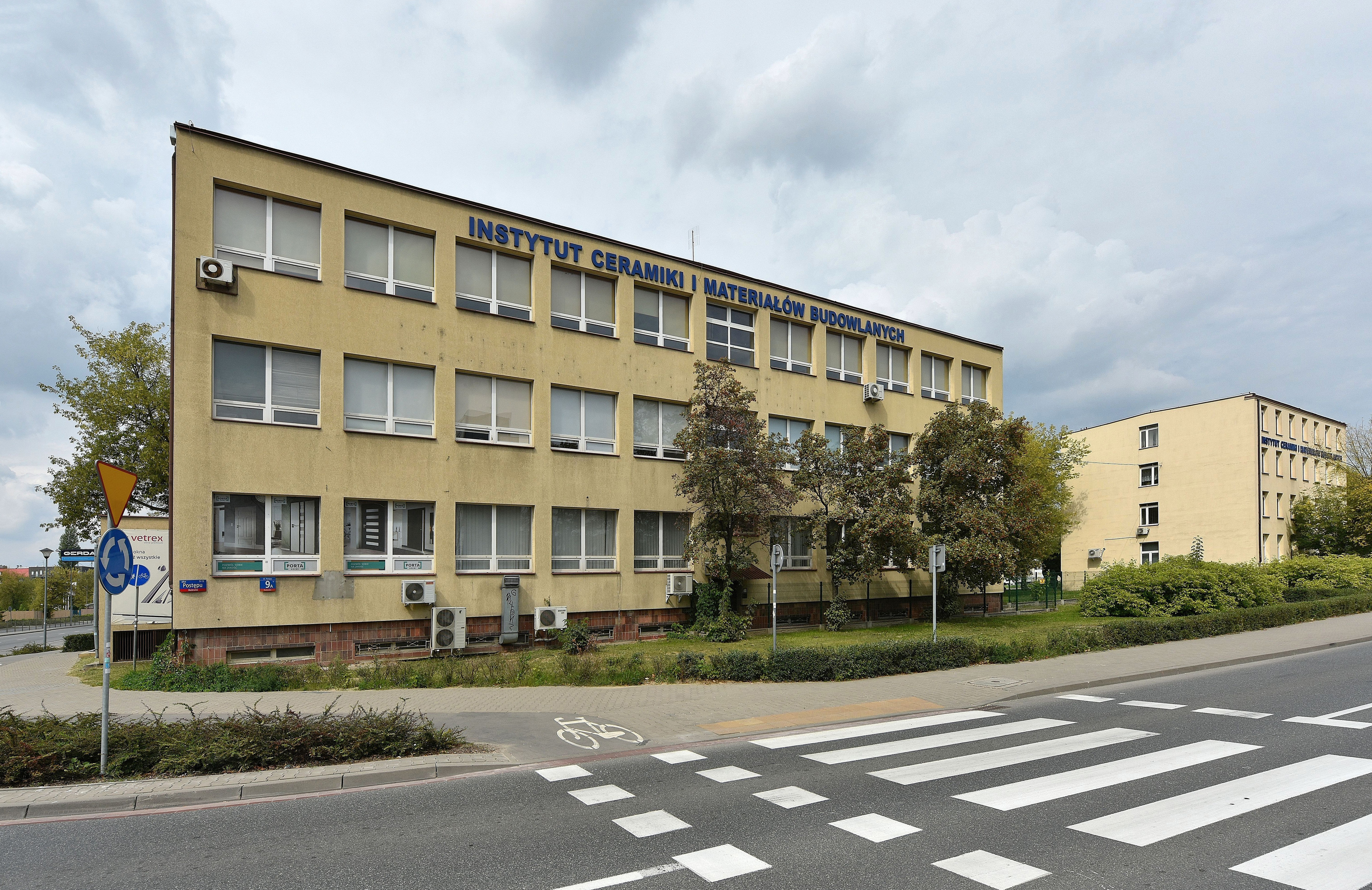 Instytut Ceramiki i Materiałów Budowlanych przy ul. Postępu 9 w Warszawie